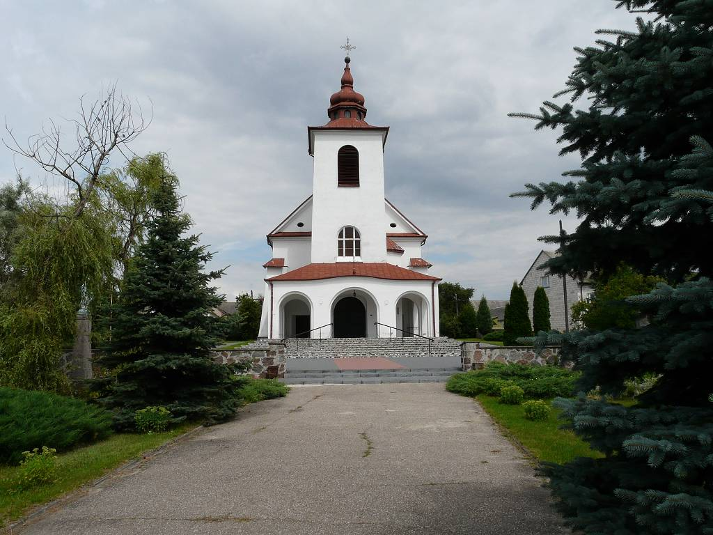 Kościół w Borkowie